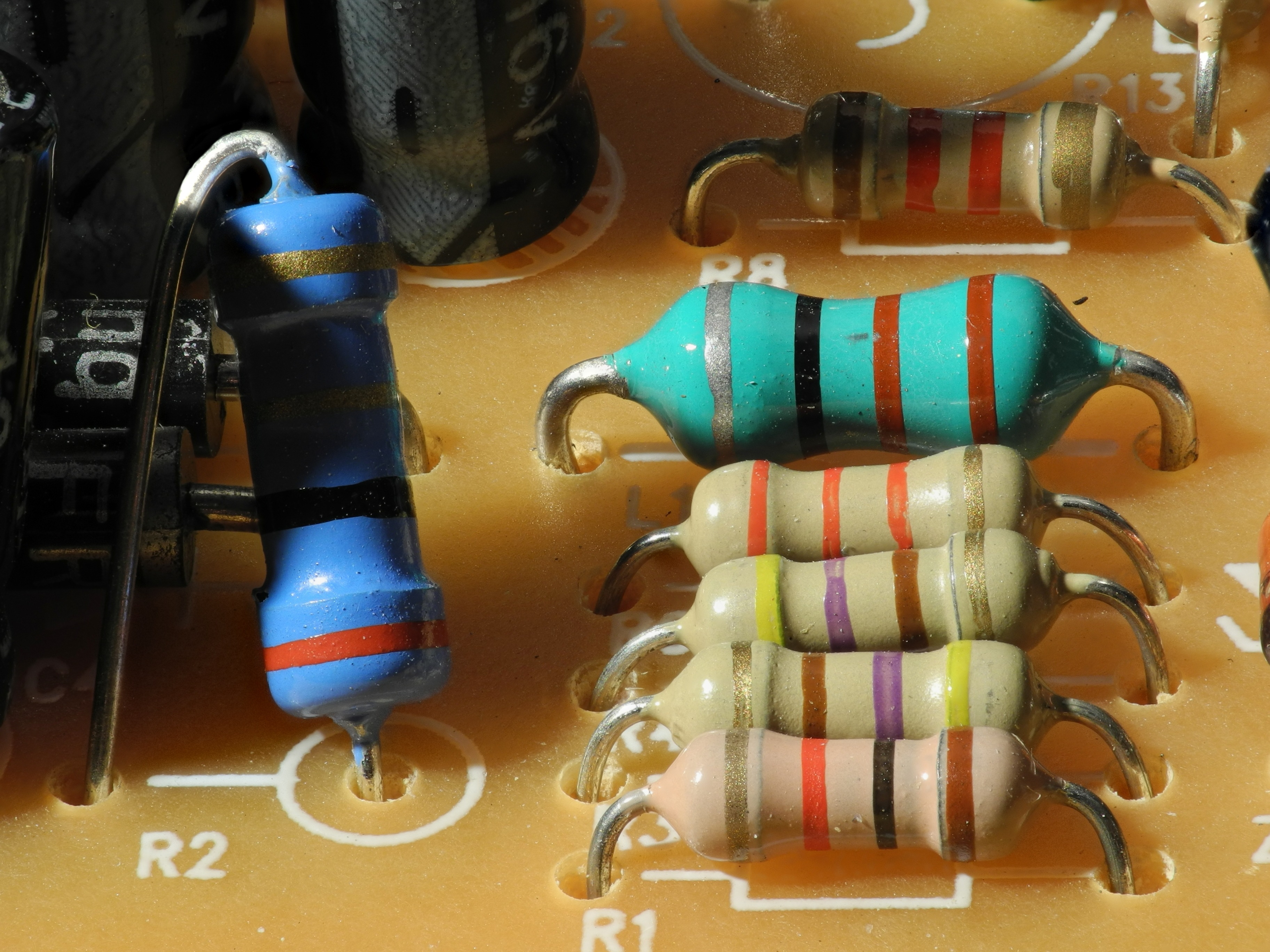 Focus stacking of 15 pictures (using Zerene Stacker).Composants électroniques (focus stacking). Image composée de 15 photos prises avec la bonnette Raynox DCR-250 et assemblées avec Zerene Stacker.